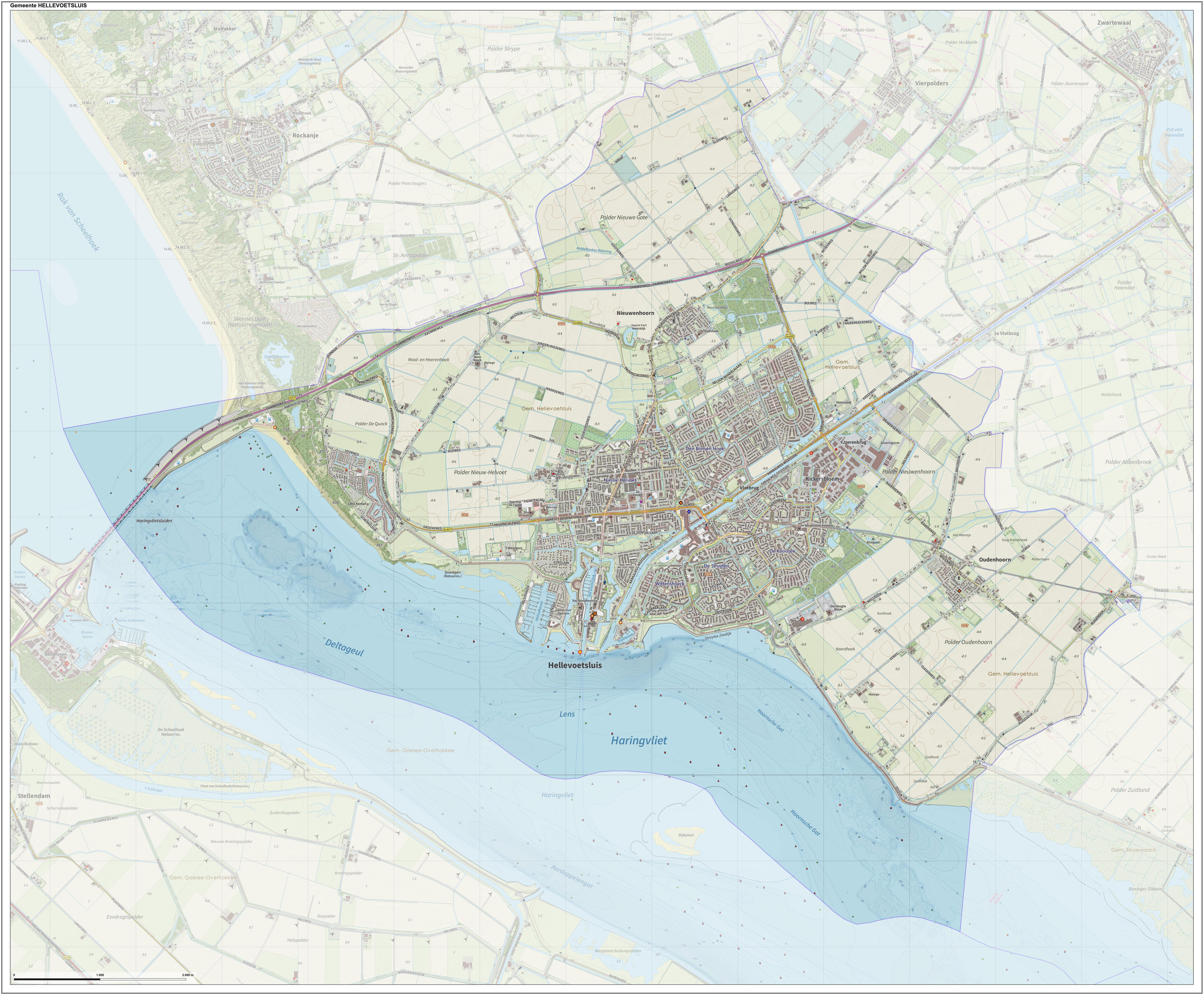 Topografische gemeentekaart. Resolutie: 400 pixels/km. Kaartbeeld samengesteld uit de open geodata van de Top10NL en Top25namen (Kadaster), Creative Commons-BY licentie. Gebouwvlakken uit open geodata BAG extract. Wegen uit de OpenStreetMap, OpenStreetMap community. Reliëfschaduw uit de Actuele Hoogtekaart AHN2. Samenstelling en kleurenschema: Jan-Willem van Aalst, met QGIS. Zie ook de Legenda.